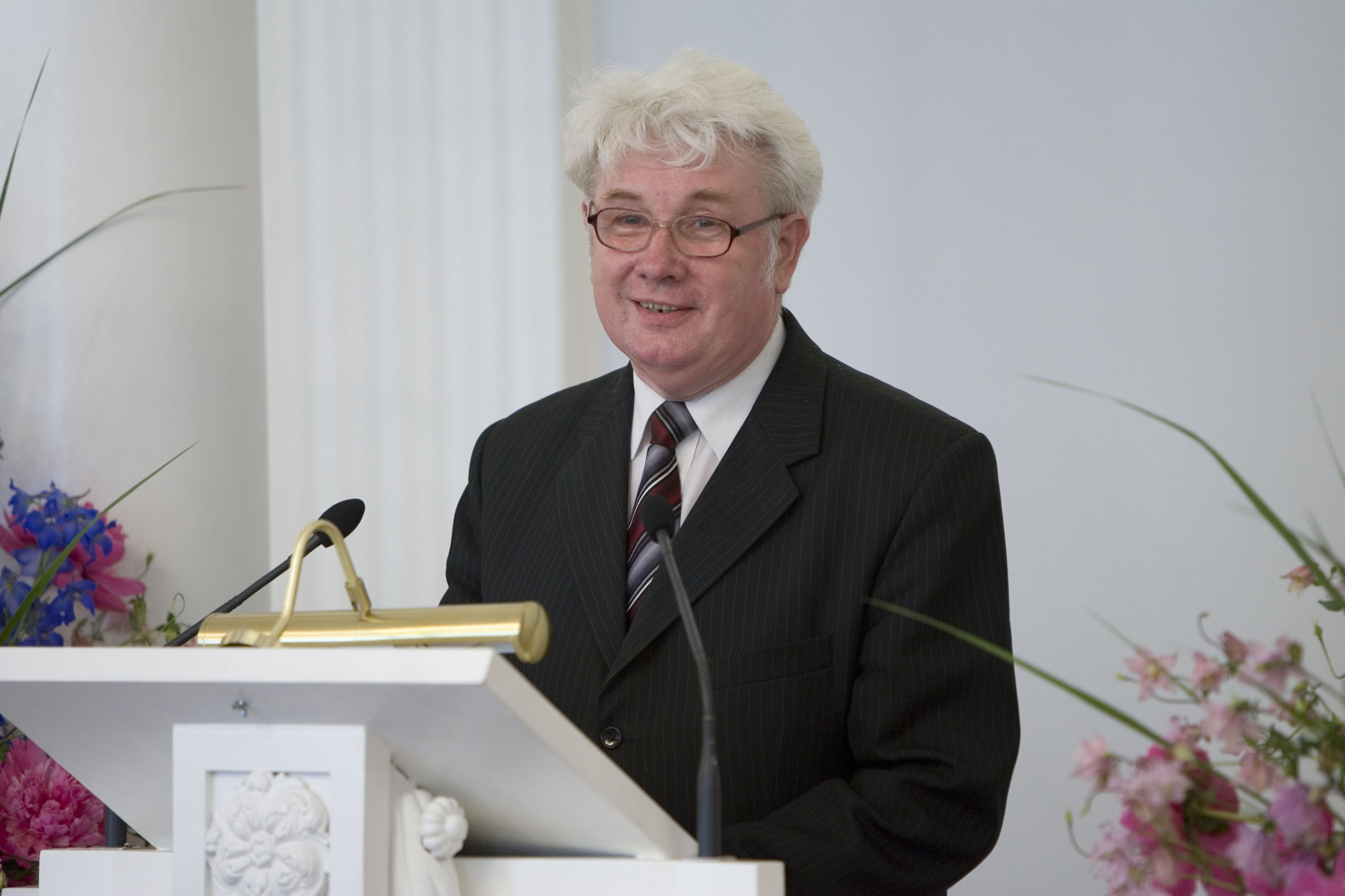 Tartu Ülikooli majandusteaduskonna lõpuaktus TÜ aulas 20. juunil 2006. Esineb TÜ professor Olev Raju.